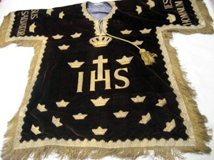 Serfimerordens häroldskåpa från 1800-talet. Bildnummer: N 22435